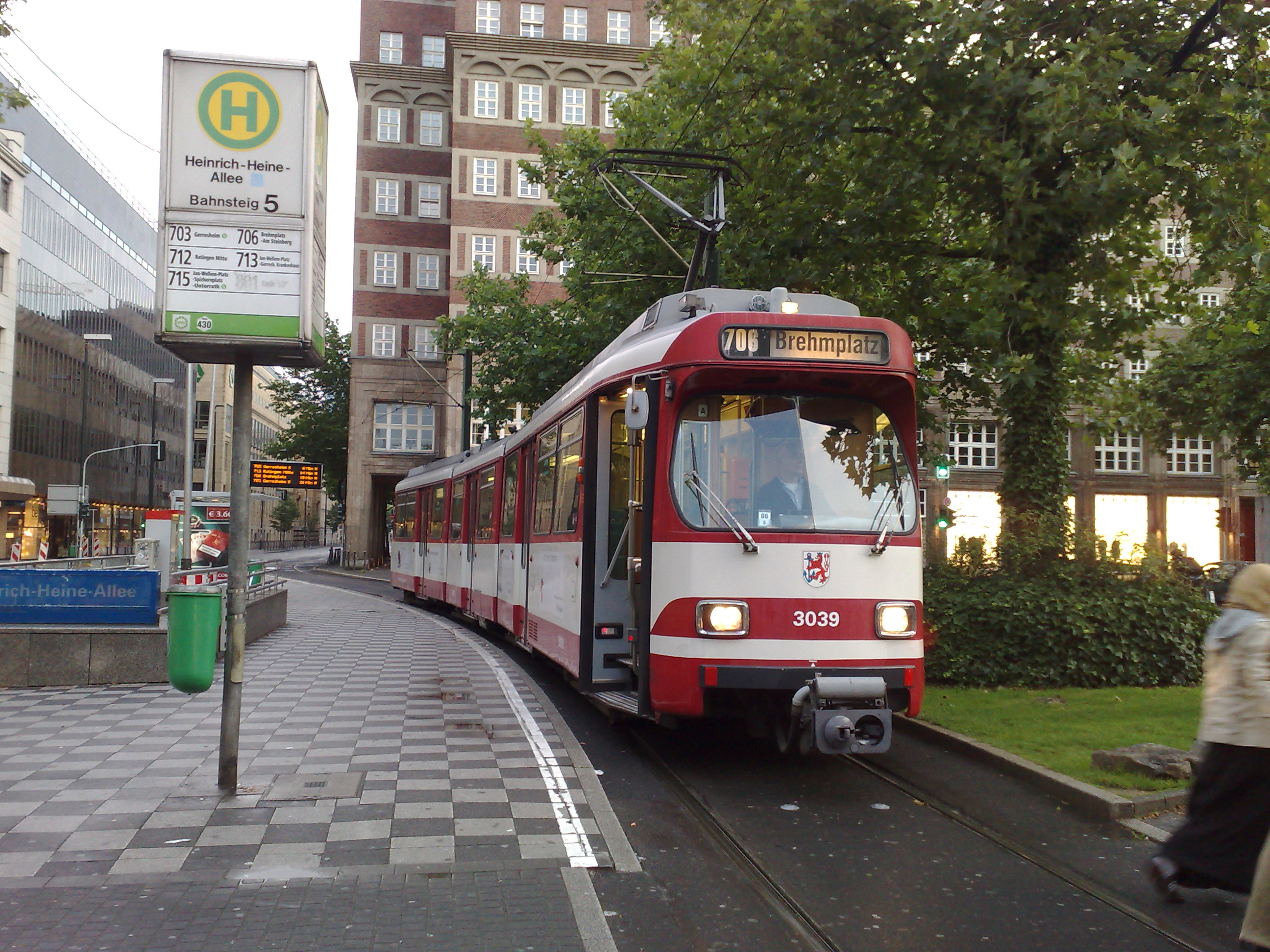 Ein DUEWAG GT8S Typ Mannheim, an der Haltestelle Heinrich Heine Allee in Düsseldorf. Gegen 2014 wird diese Oberirdische Haltestelle Geschichte sein.